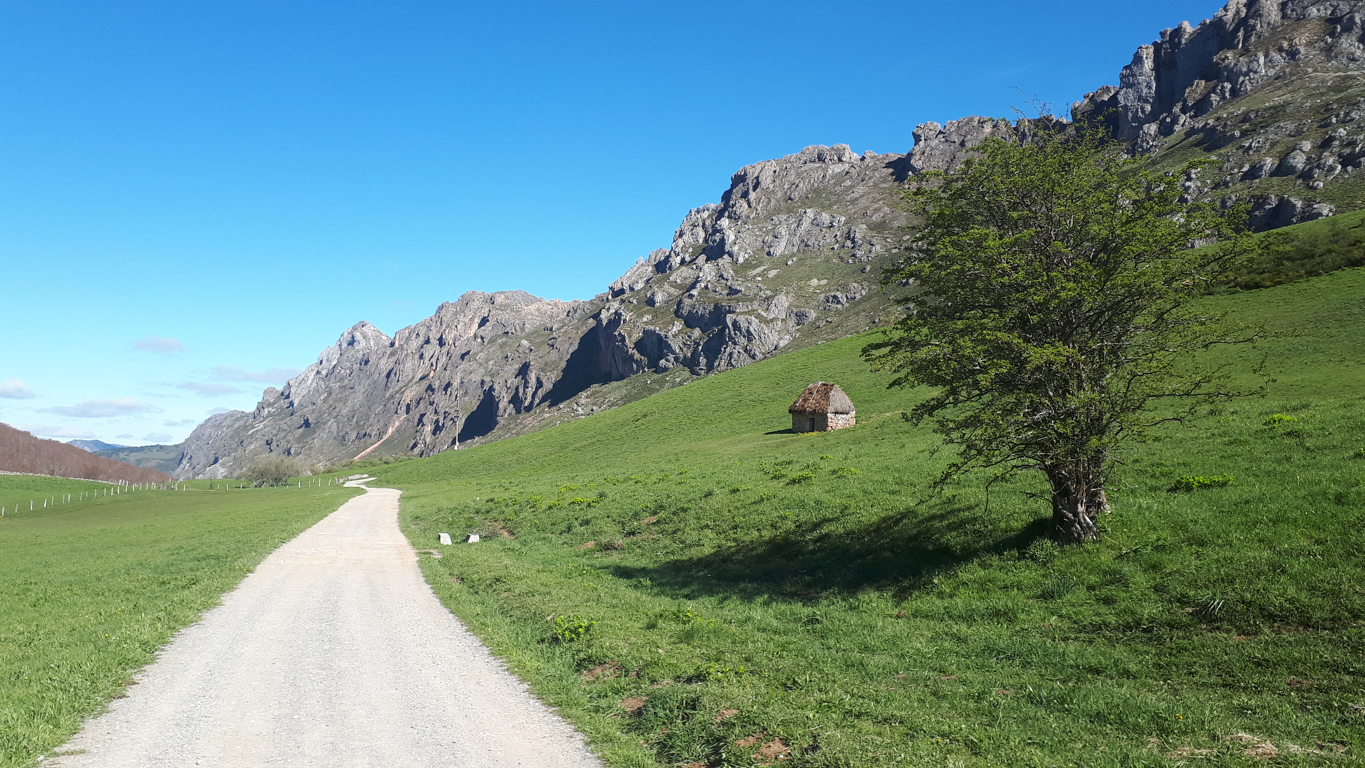 Somiedo This is a photography of a Special Area of Conservation in Spain with the ID: ES0000054. Natura2000 entry, EEA entry